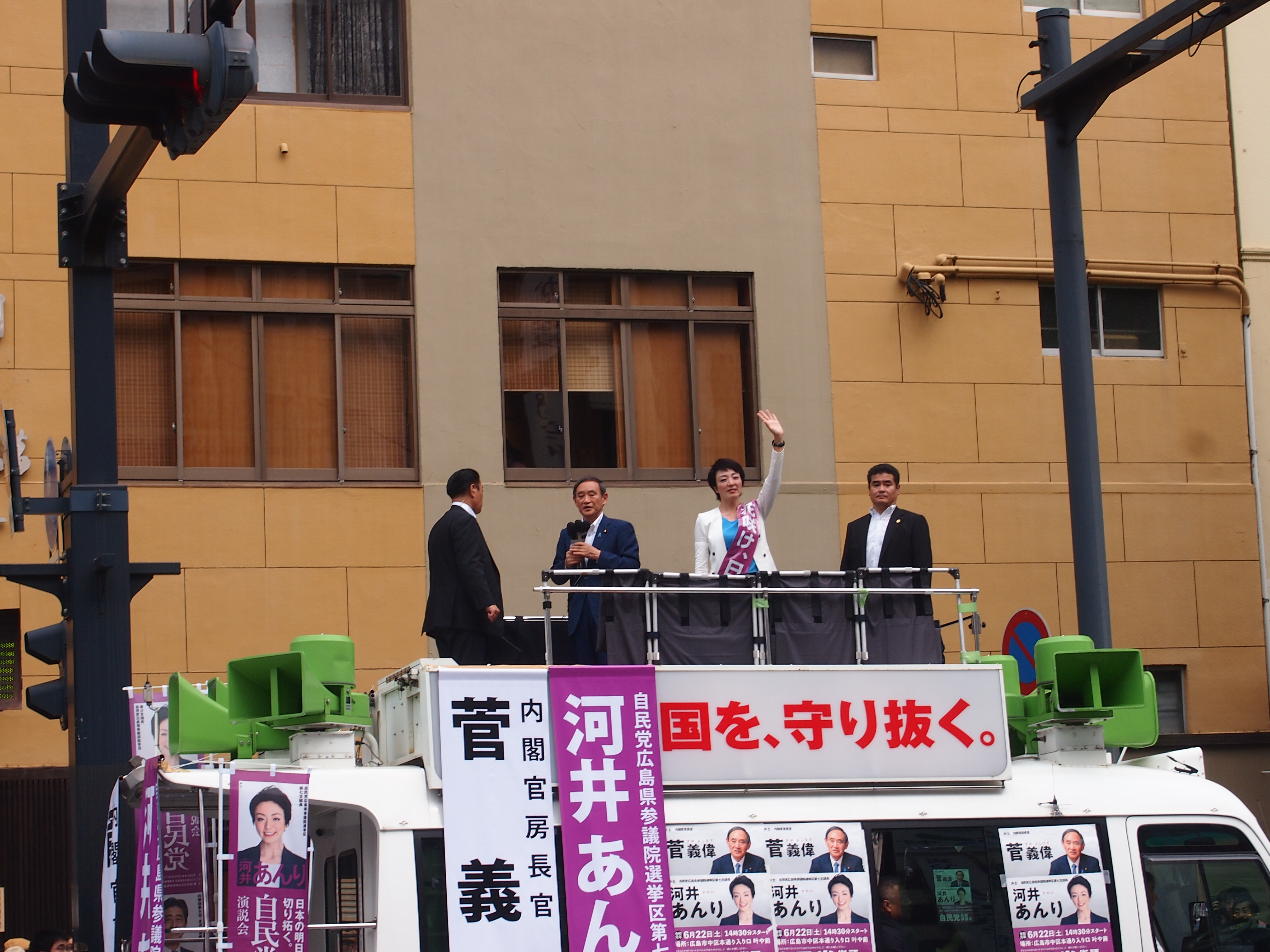 河井案里（河井あんり）